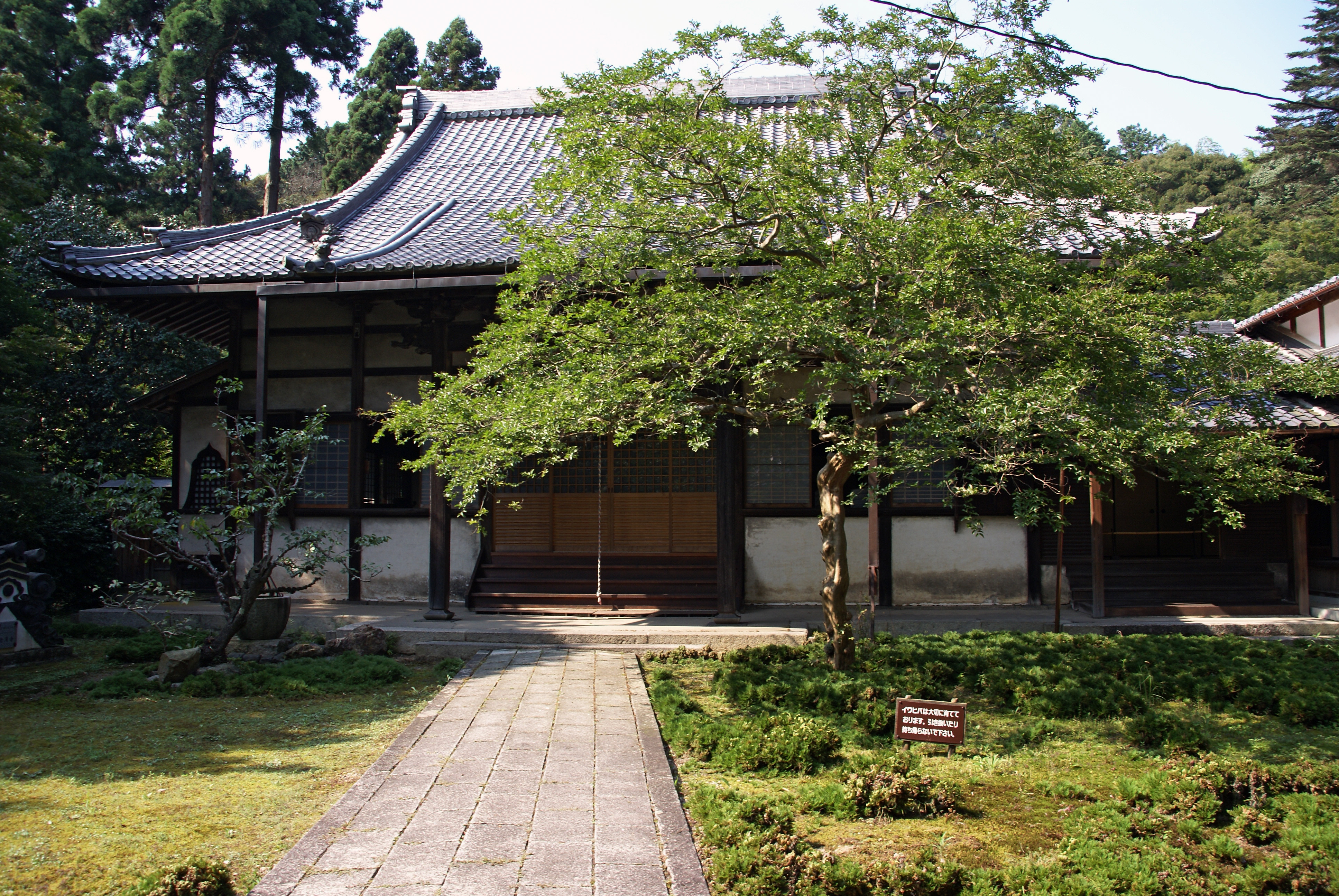 Seiganji in Maibara, Shiga prefecture, Japan